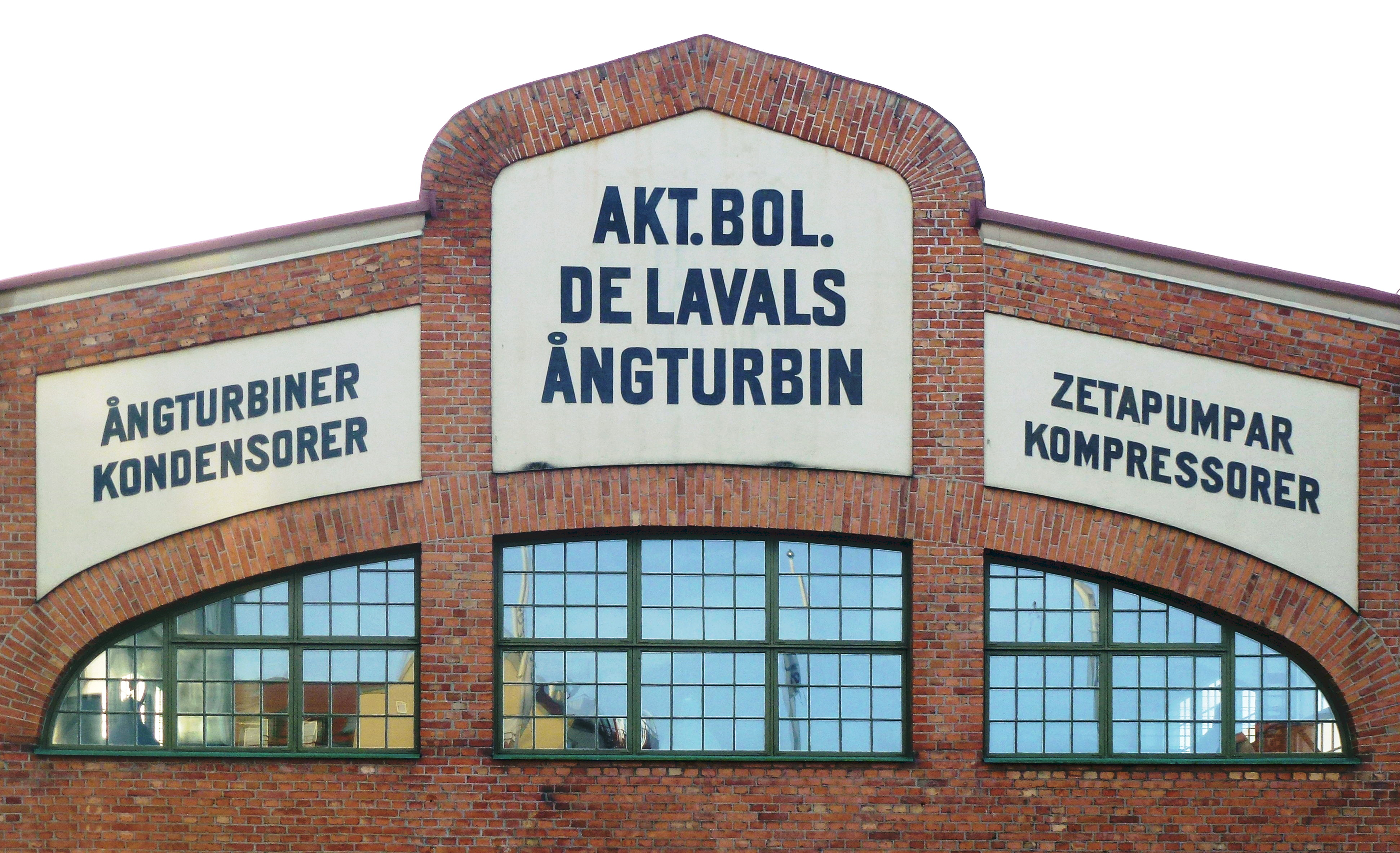 De Lavalls ångturbinfabrik i Järla sjö